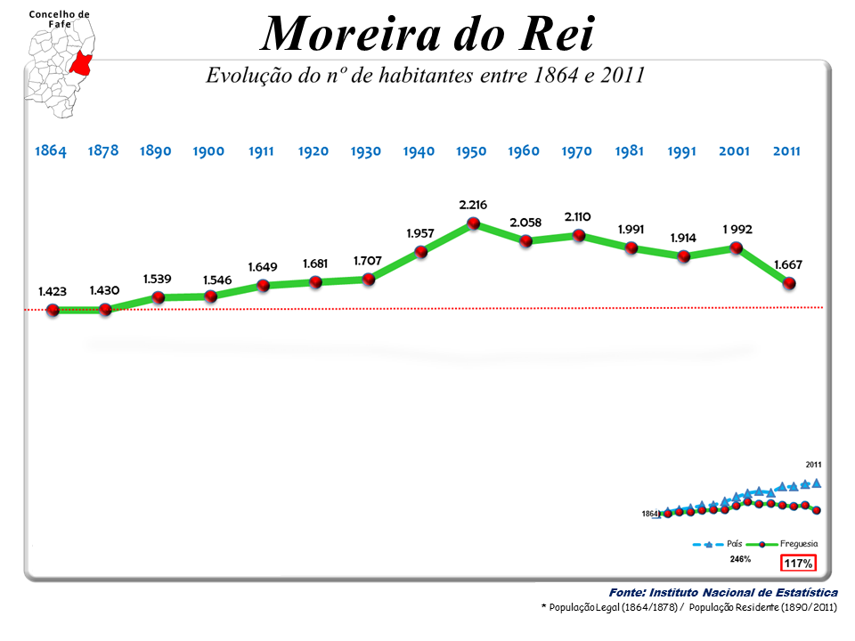 Censos 1864/2011